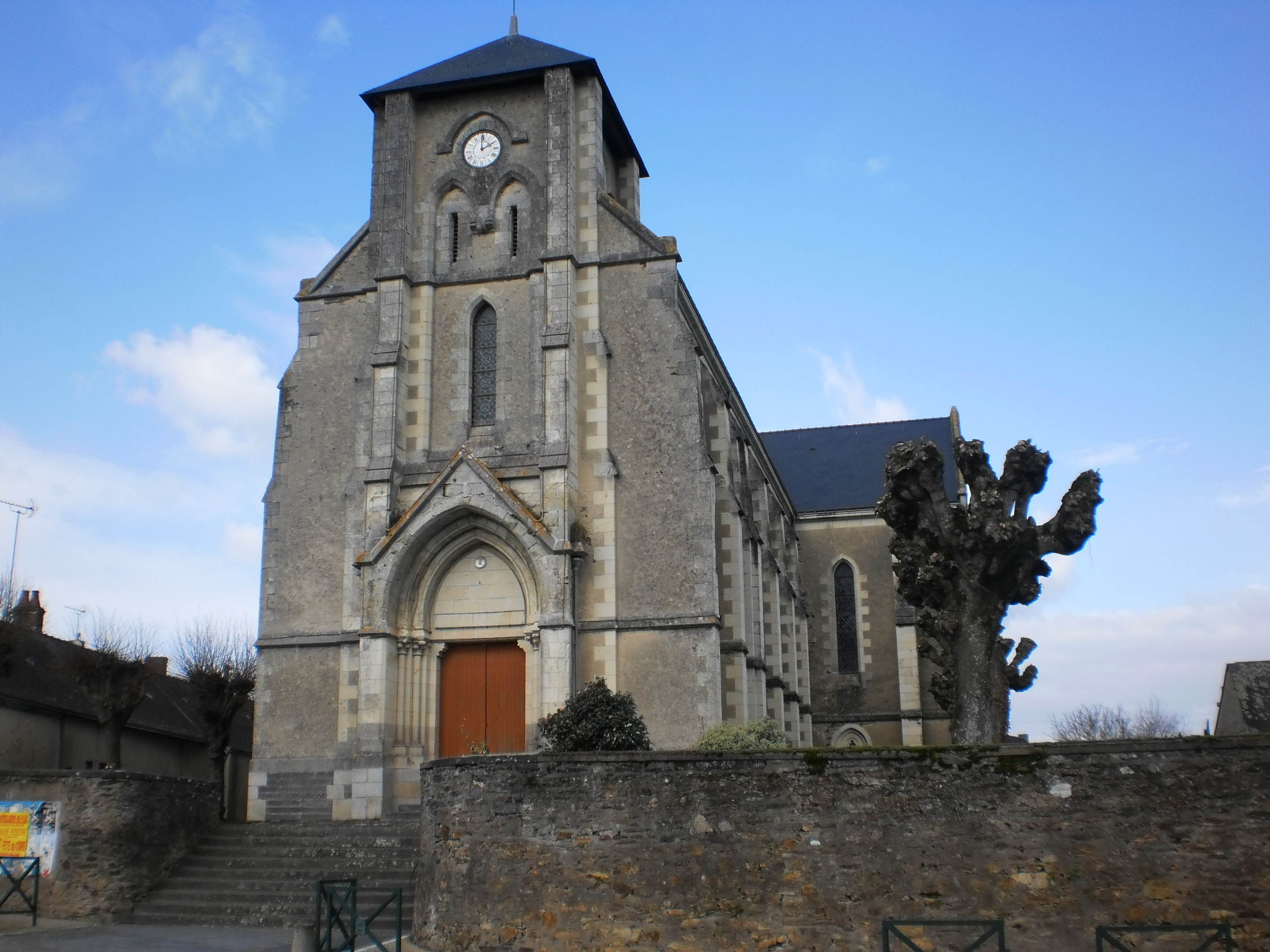 Juigné-des-Moutiers (Loire-Atlantique) - France - église Saint-Julien